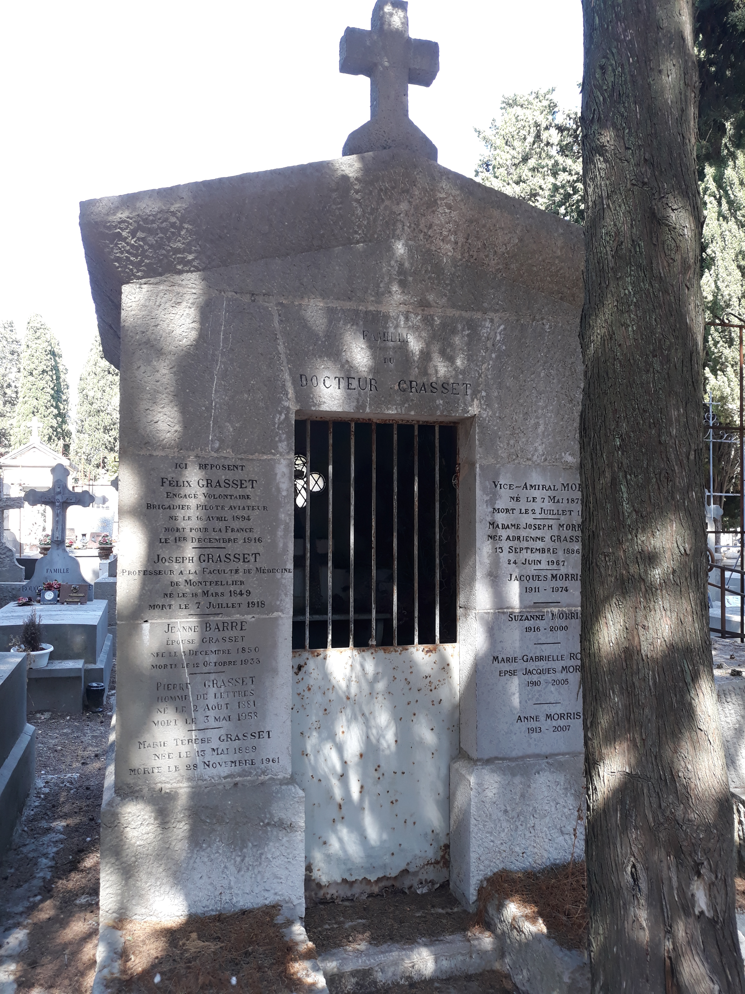 Das Grab des französischen Neurologen Joseph Grasset auf dem Cimetière Saint-Lazare in Montpellier.